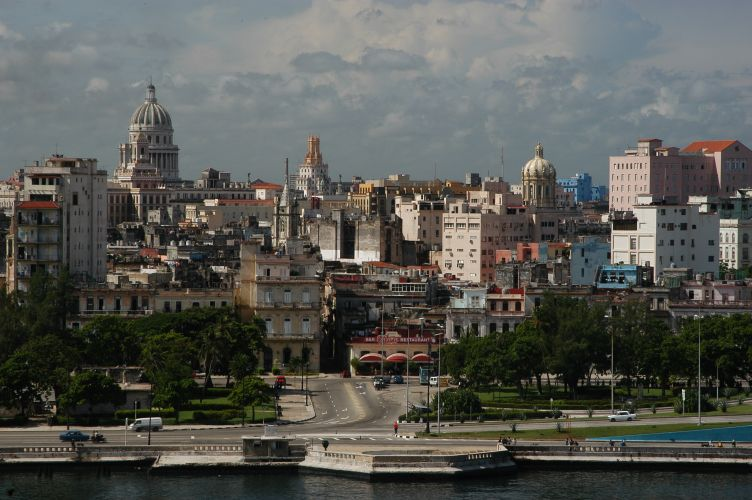 La Habana, Cuba, september 2005, info in de Metadata